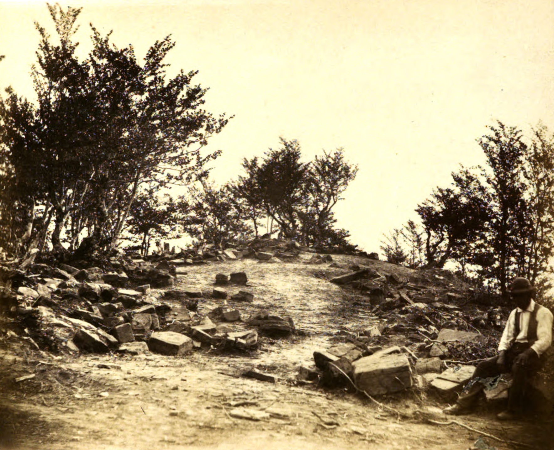 pianoro interno durante gli scavi